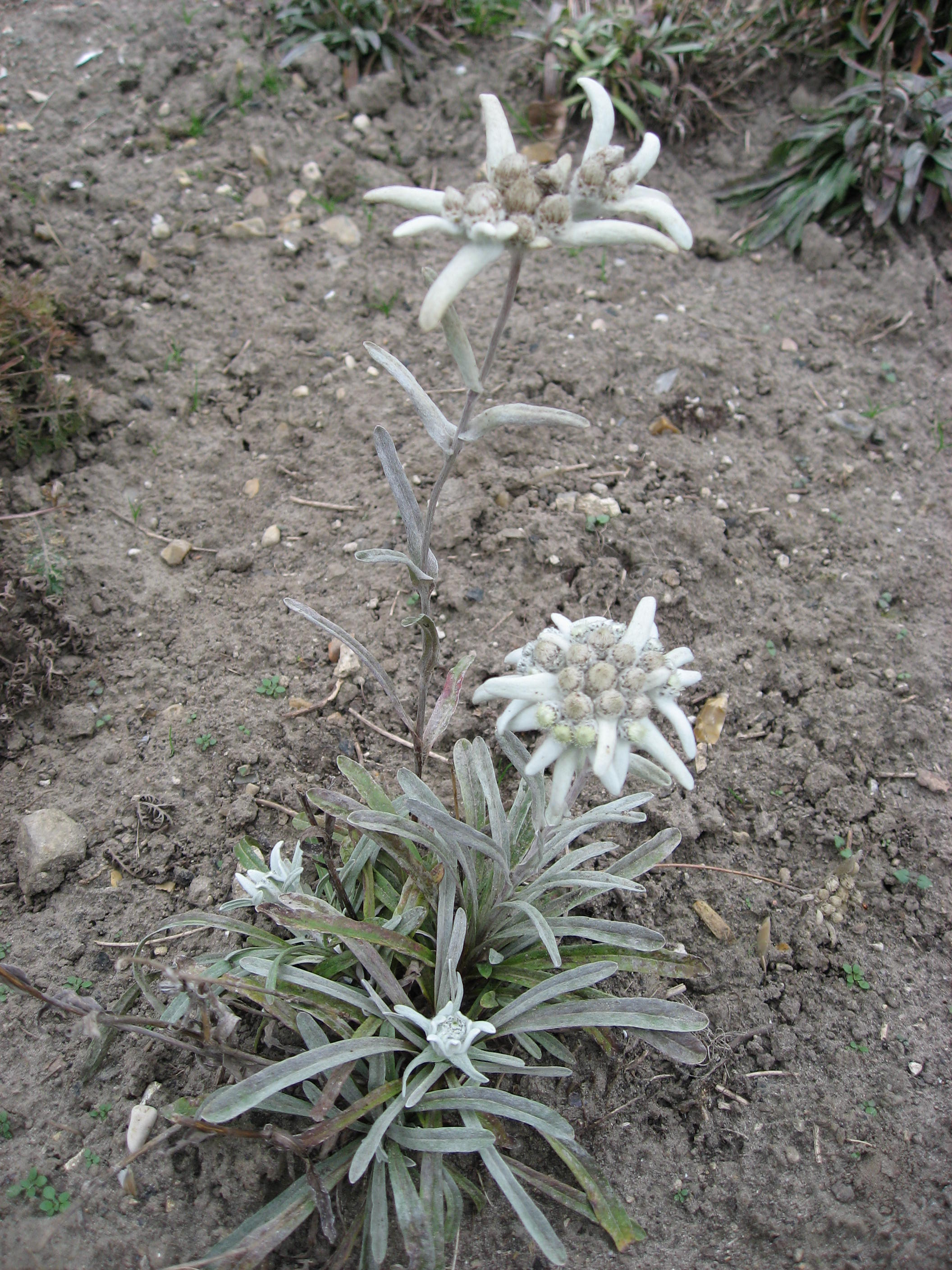 Leontopodium alpinum in Conservatoire National des Plantes à Parfum Map: 48° 23' 49" N 2° 28' 45" E